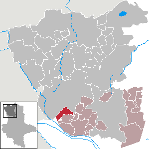 Lage von Köckte im Altmarkkreis Salzwedel